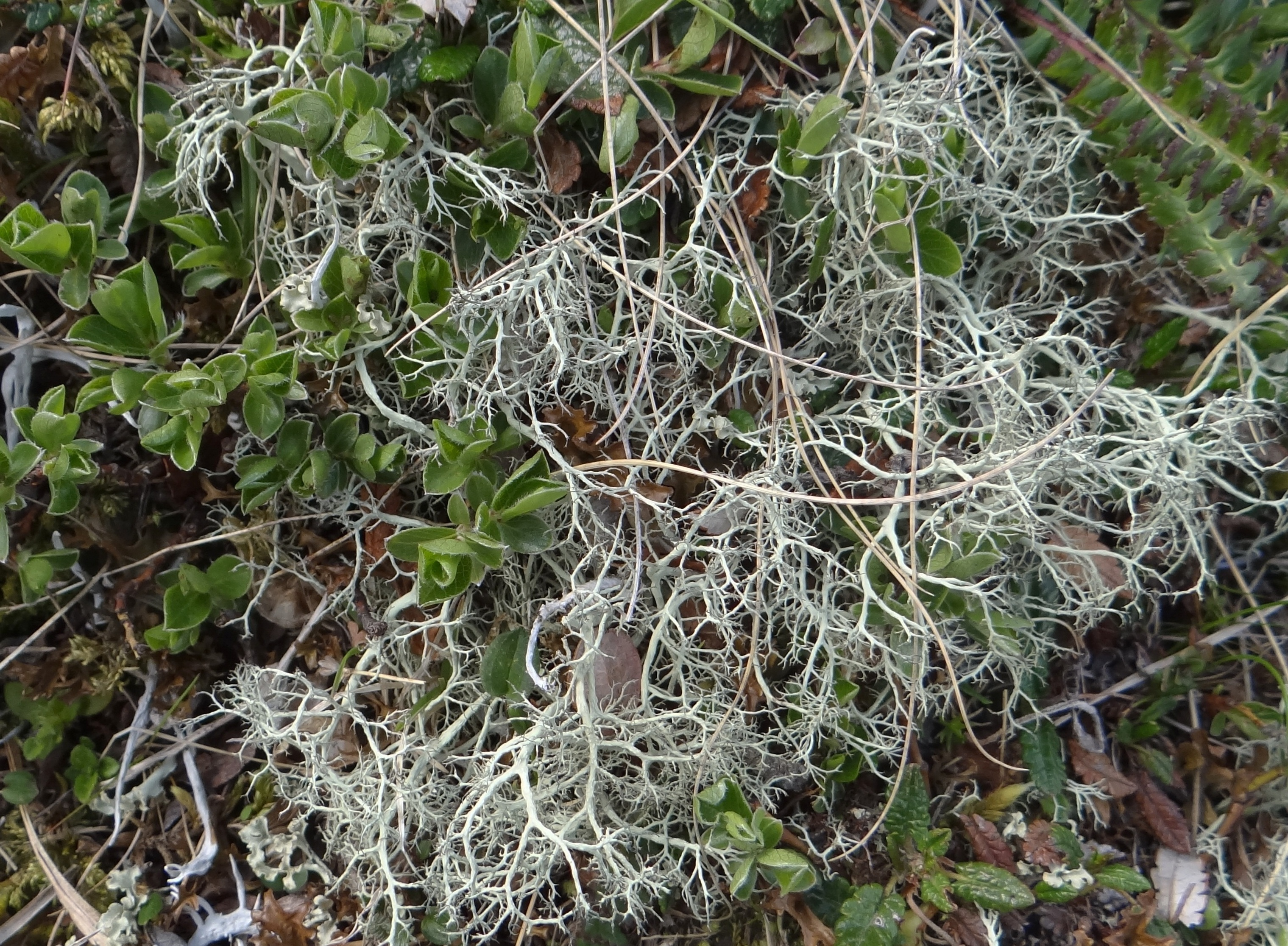 Alectoria ochroleuca (habitat:Tatra Mountains, Ciemniak)